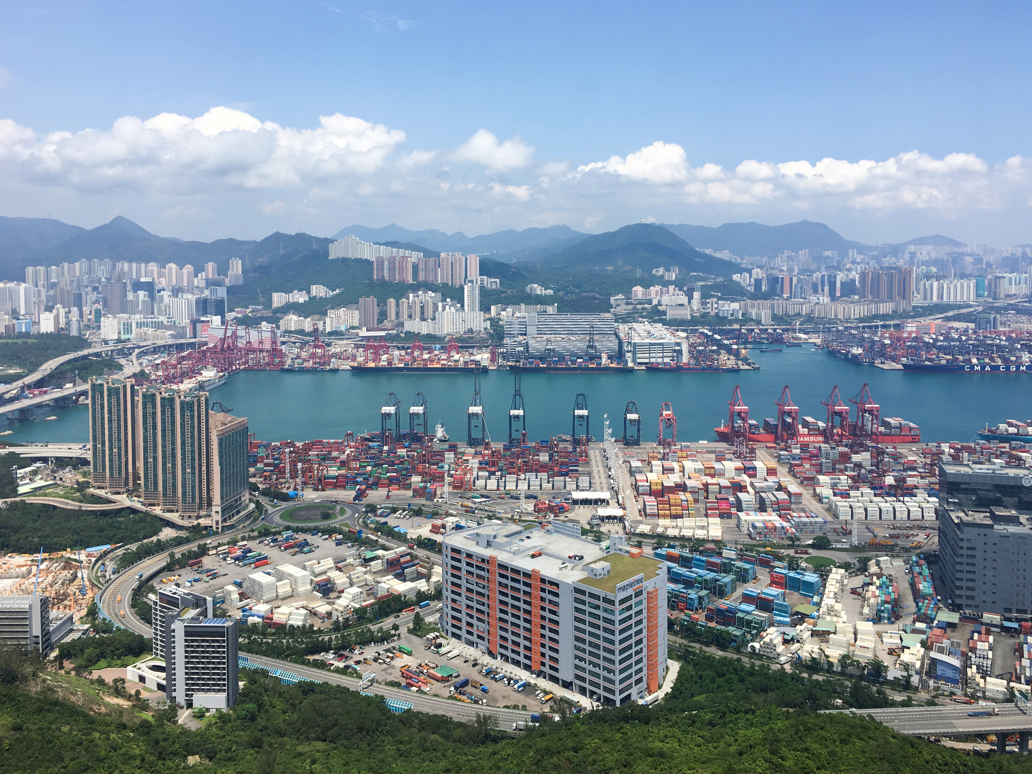 Kwai Tsing Container Terminal